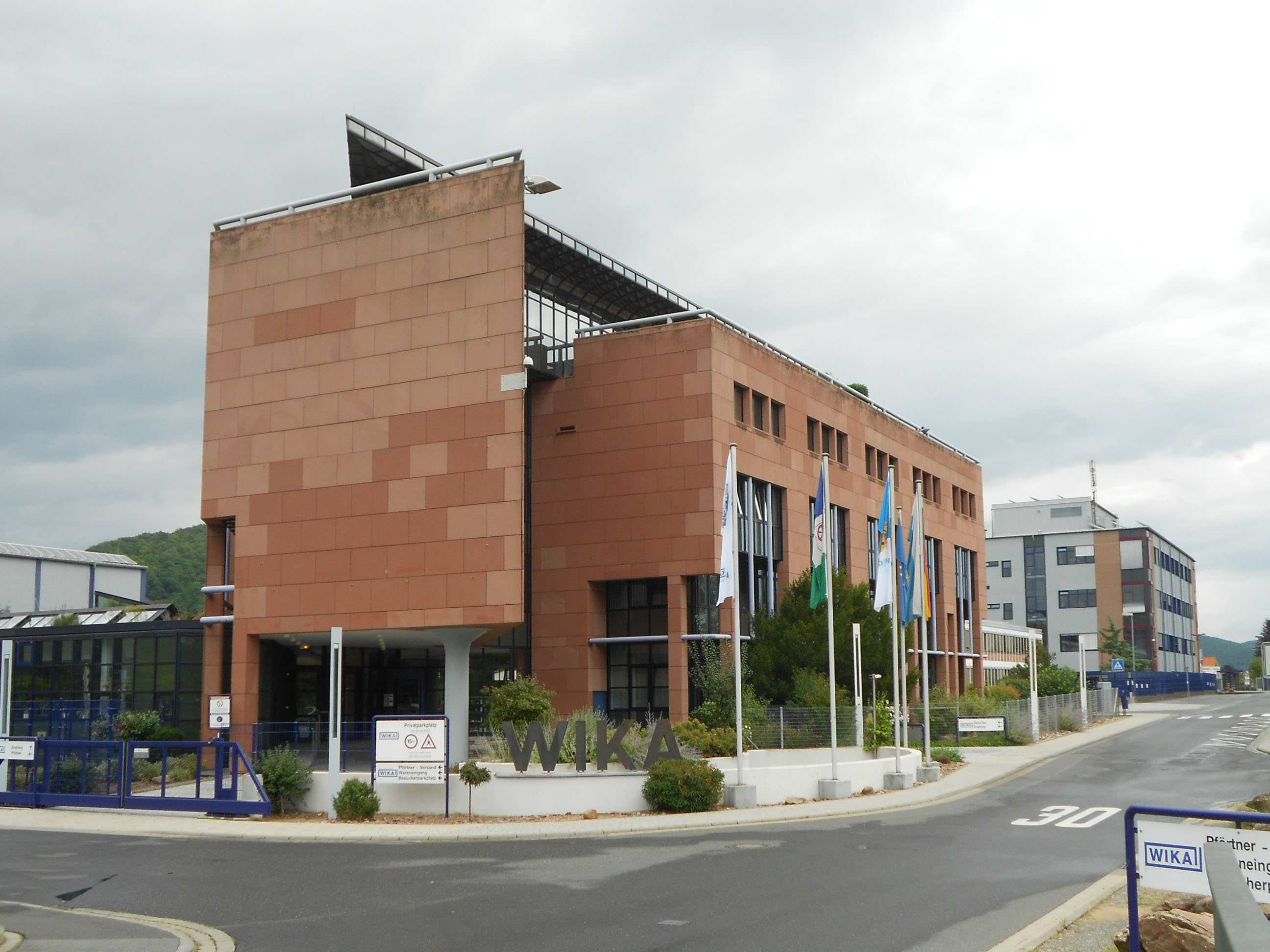 Wika in Klingenberg am Main (Ortsteil Trennfurt)